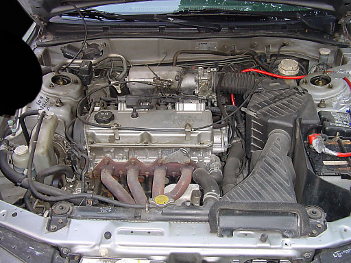 Mitsubishi Galant EA0 Motor 2.0 Benziner